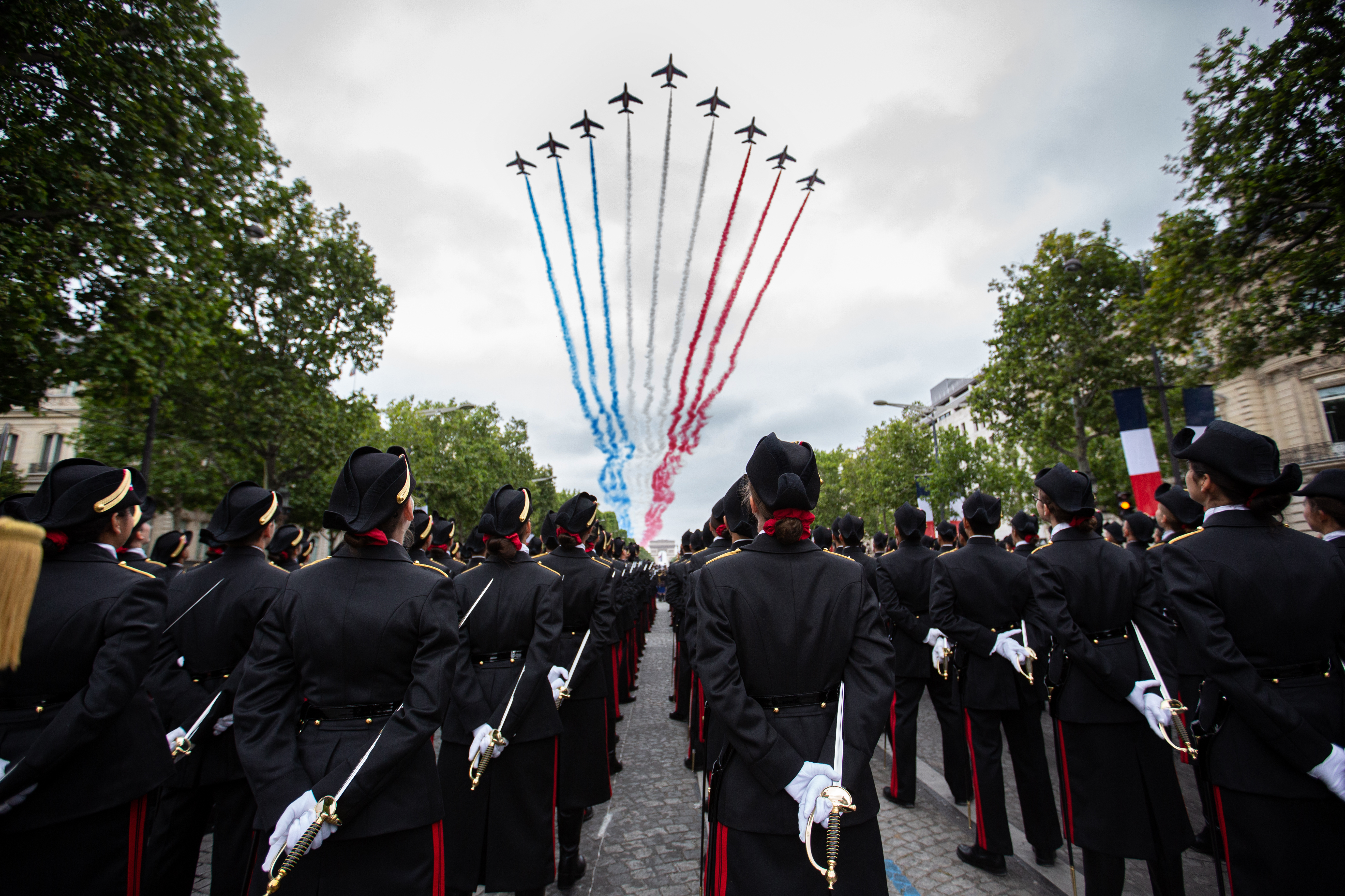 Défilé du 14 juillet 2019 pour les élèves de la promotion 2018 © École polytechnique - J.Barande